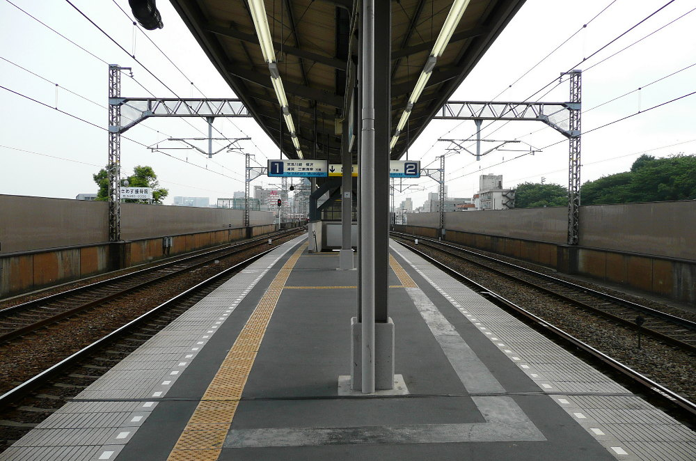 京急本線ja:鮫洲駅ホーム 投稿者↑PON（ウエポン）が2007年7月7日に撮影 一部編集の上で2007年7月24日 (火) 16:49 (UTC)にアップロード